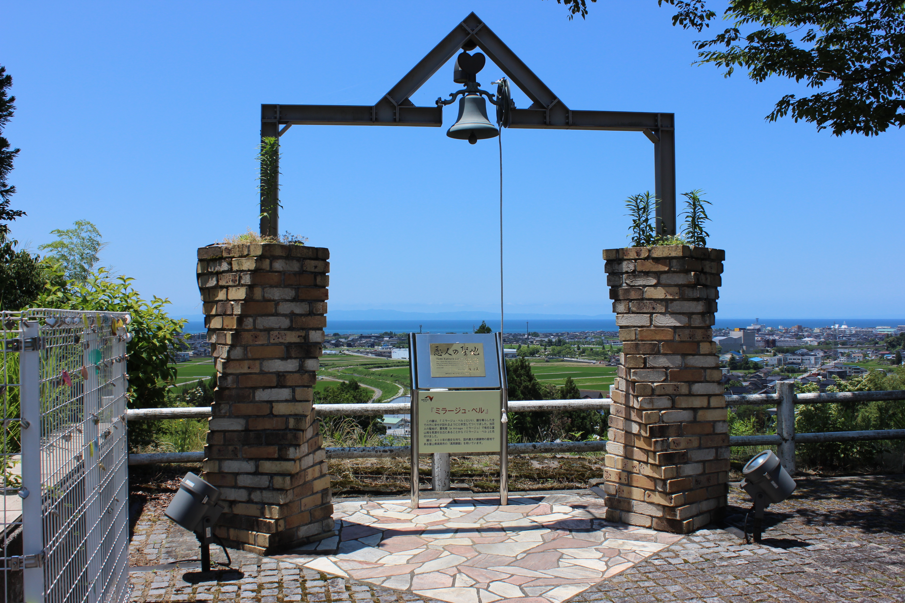 有磯海サービスエリア（下り・新潟方面）に設置されている「ミラージュベル」。恋人の聖地としての認定を受けている。 Canon EOS Kiss X5